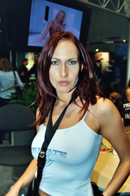 Sophie Evans